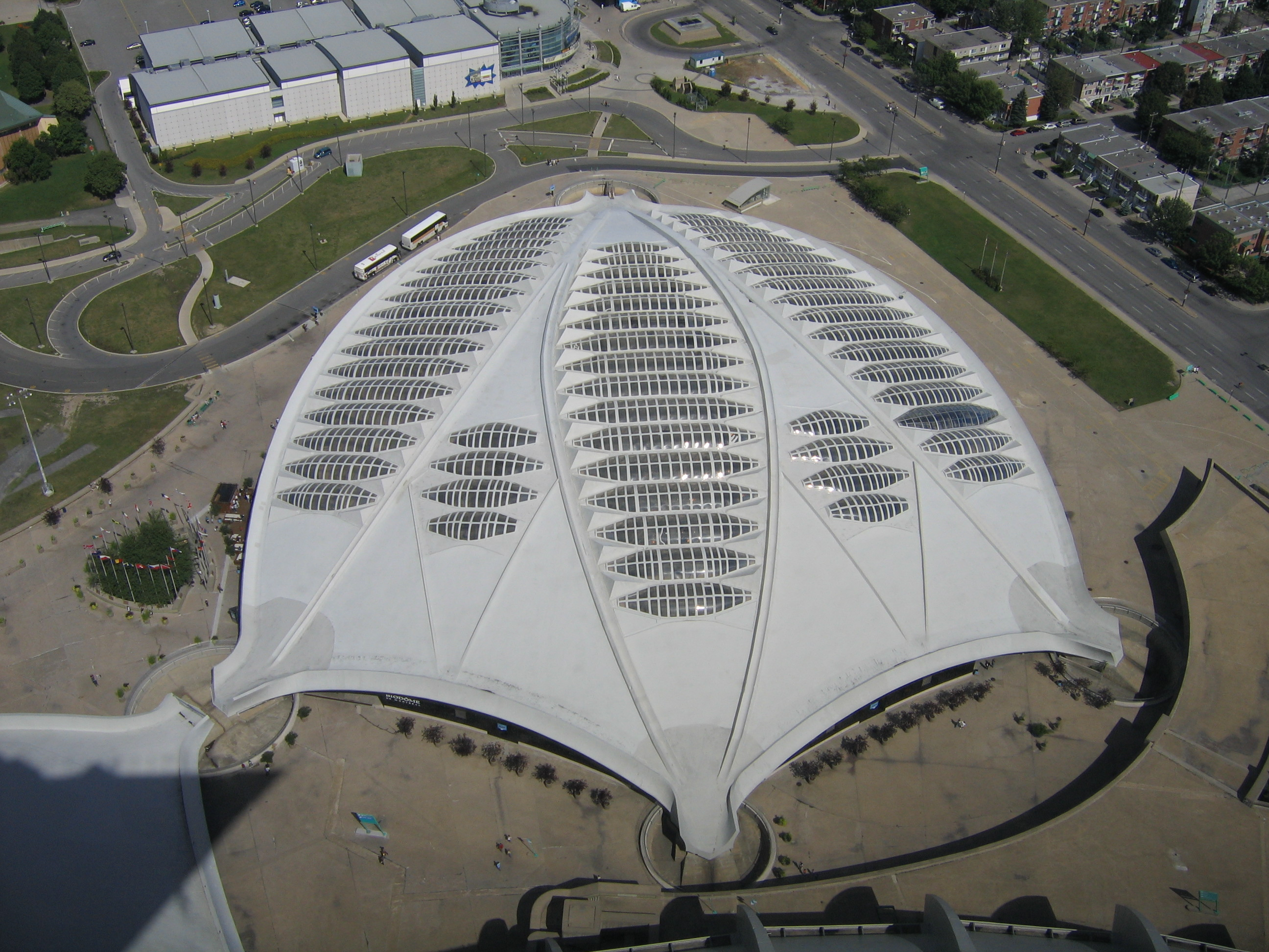 Le Biodôme de Montréal - The Montreal Biodome